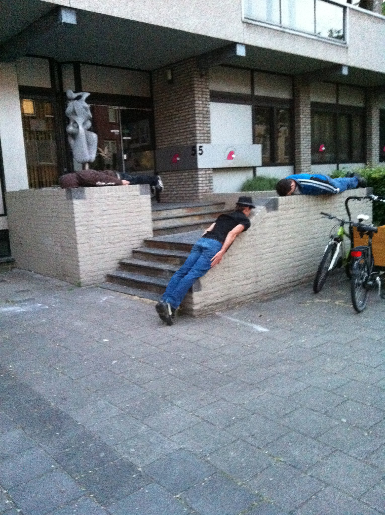 "Plankers" in actie